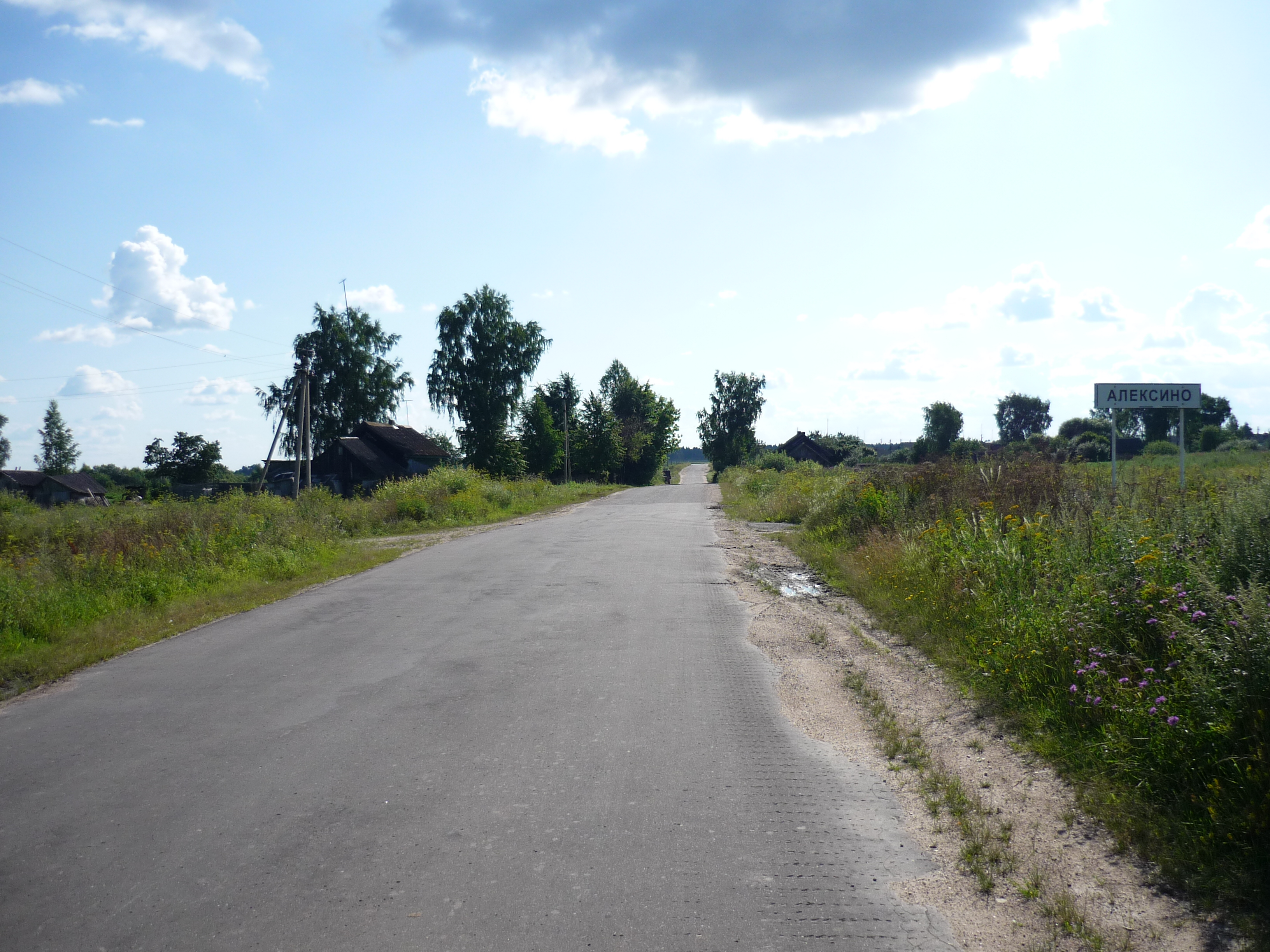 Въезд в Алексино